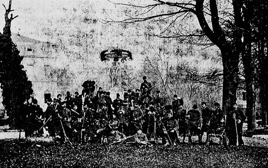 "Tirailleurs-éclaireurs du commandant Féry d'Esclands (siège de Paris, 6e secteur). M. Geoffroy Saint-Hilaire, directeur du Jardin d'acclimatation (assis au pied de l'arbre à gauche) et le professeur A. Milne-Edwards, du Muséum d'histoire naturelle (debout contre le tronc du même arbre) faisaient partie de cette compagnie."